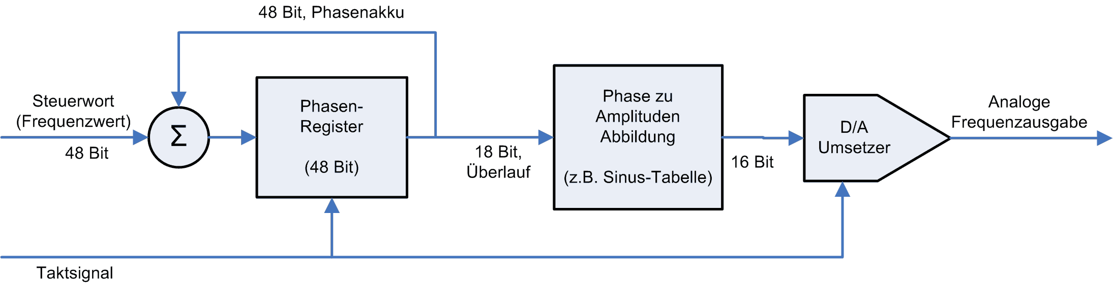 Frequency tunable DDS system, diagram